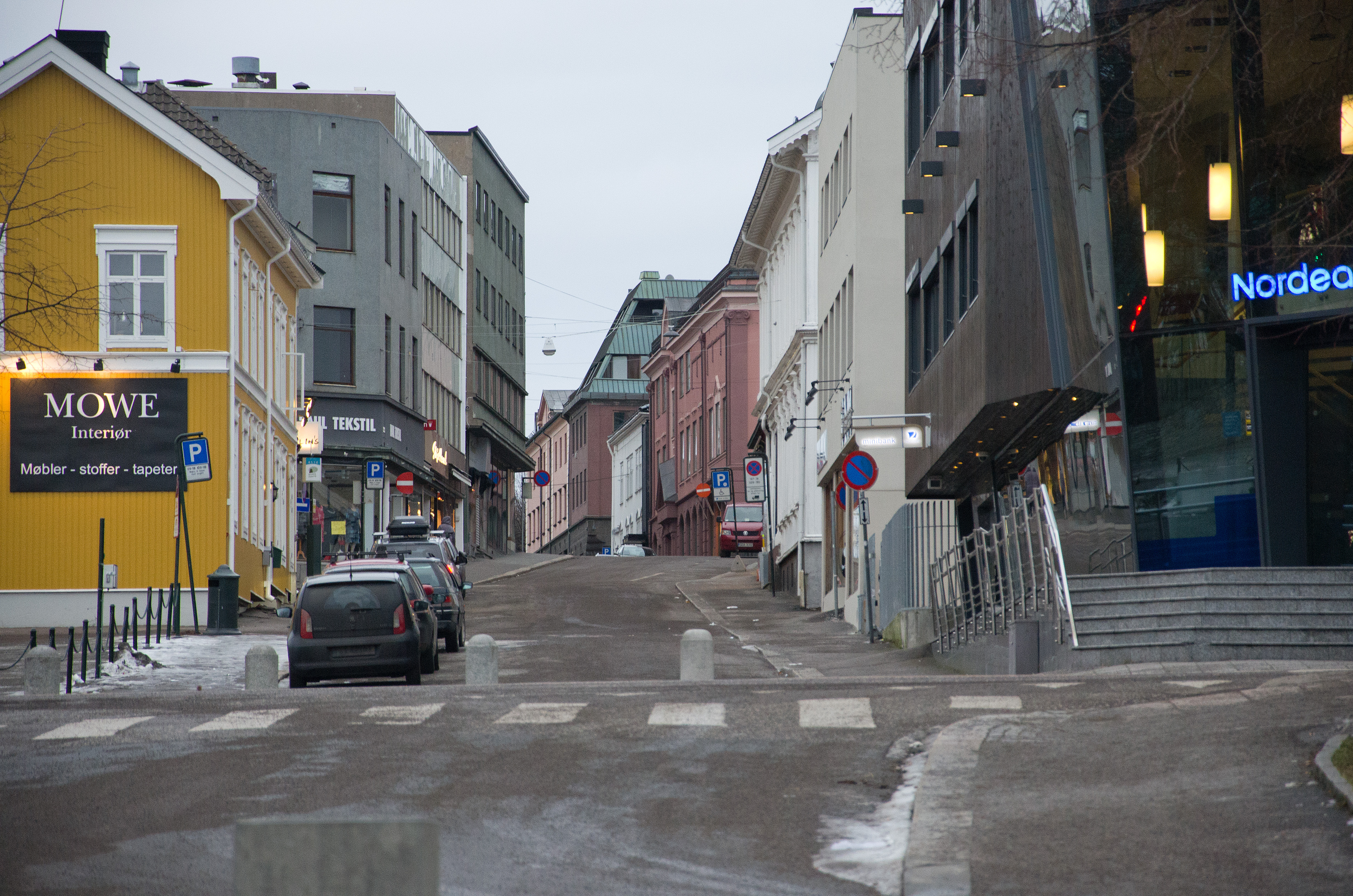 Møllegaten i Tønsberg. Nærmest i bildet krysser den Nedre Langgate.